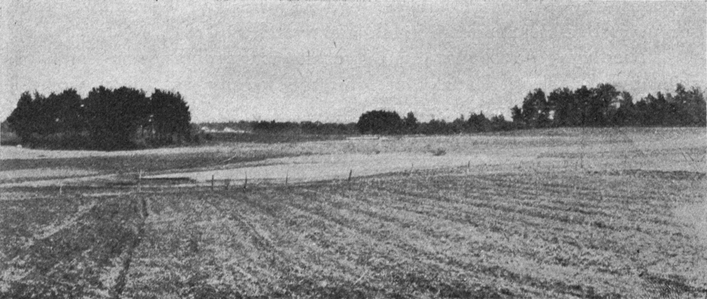 Беларуская (тарашкевіца): Угар (Uhar). Месца, дзе стаяла места